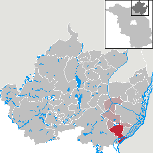 Schöneberg in Brandenburg (Country) - District Uckermark